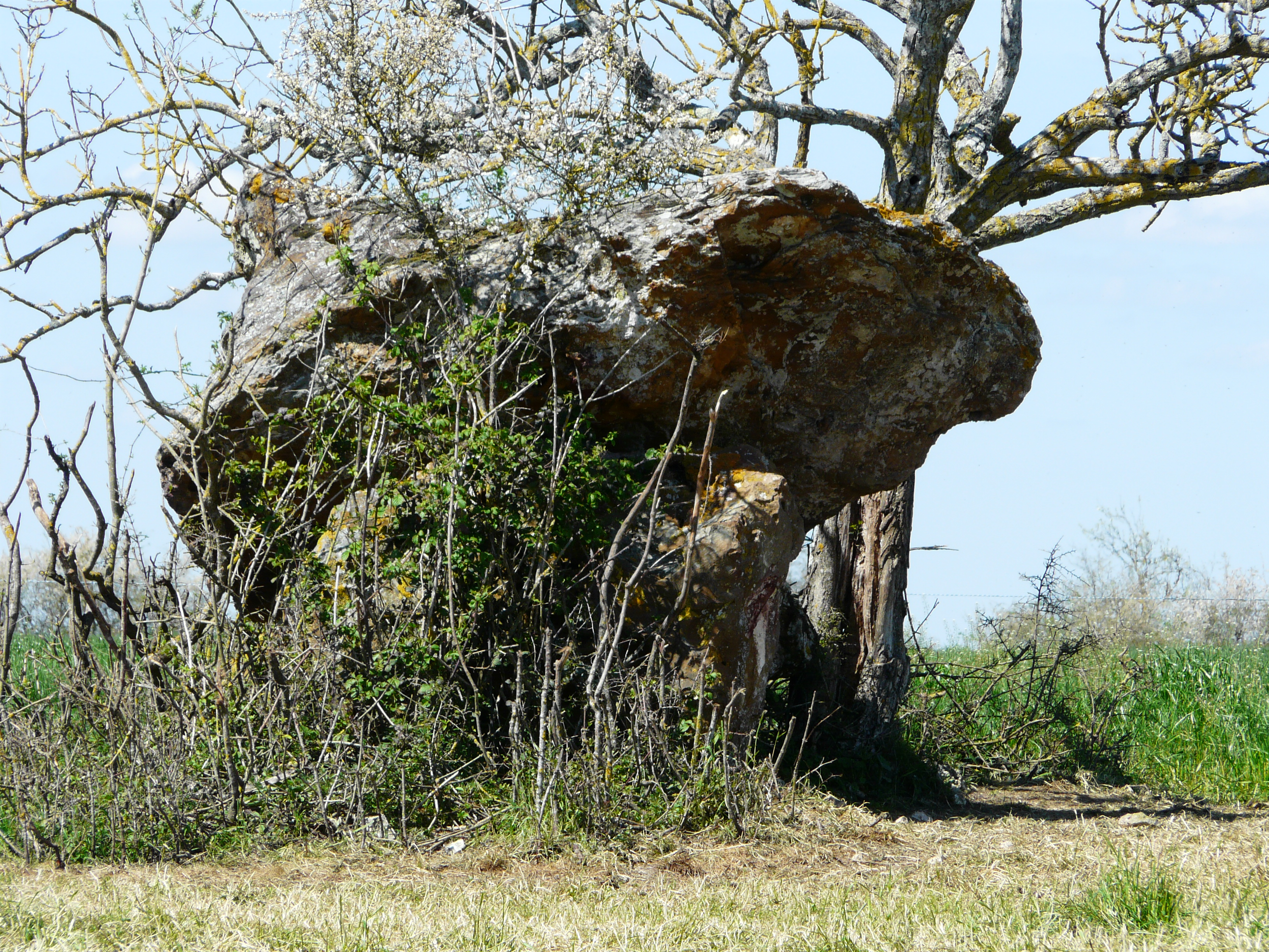 Le dolmen de Peyre Nègre, Beaumont-du-Périgord, Dordogne, France.